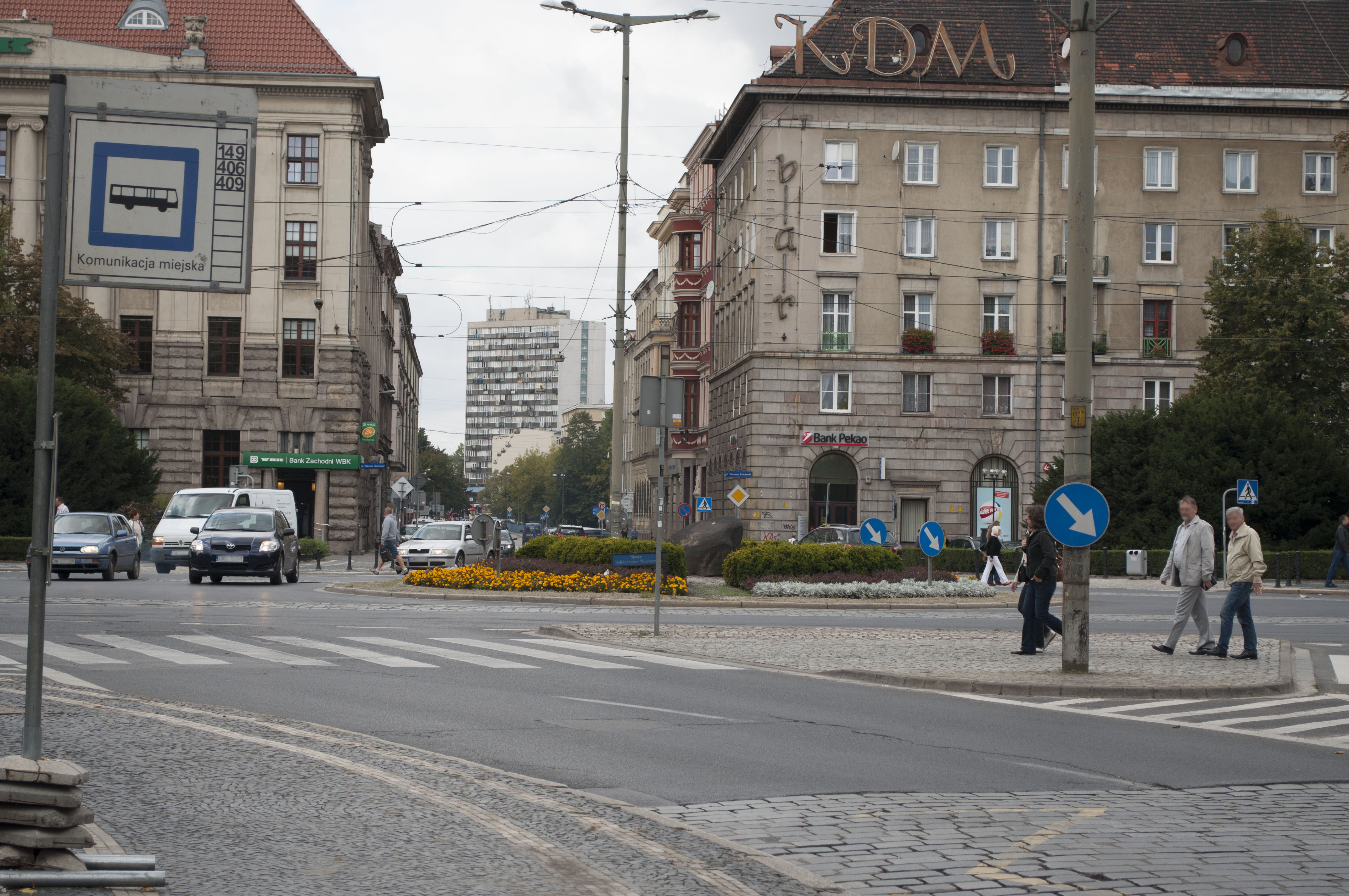 Założenie urbanistyczne plac Kościuszki, Miasto Wrocław - Stare Miasto